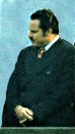 Brandenburger Tor, Berlin (DDR), Aussichtsplattform für Regierungsgäste der DDR Auf der Tribüne eine Regierungsdeligation der Demokratischen Volksrepublik Jemen Ali Nasser Muhammad, Staatschef der Demokratischen Volksrepublik Jemen